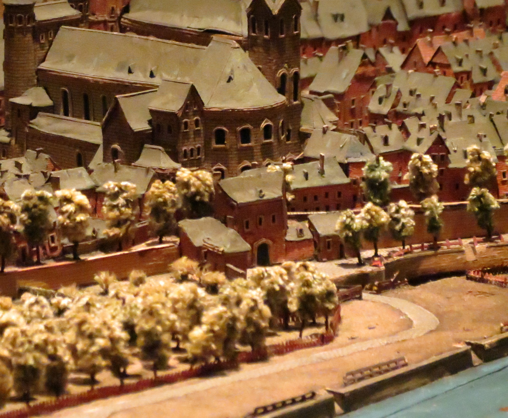 Plan Relief 02 Maastricht 7 PBA Lille 2019